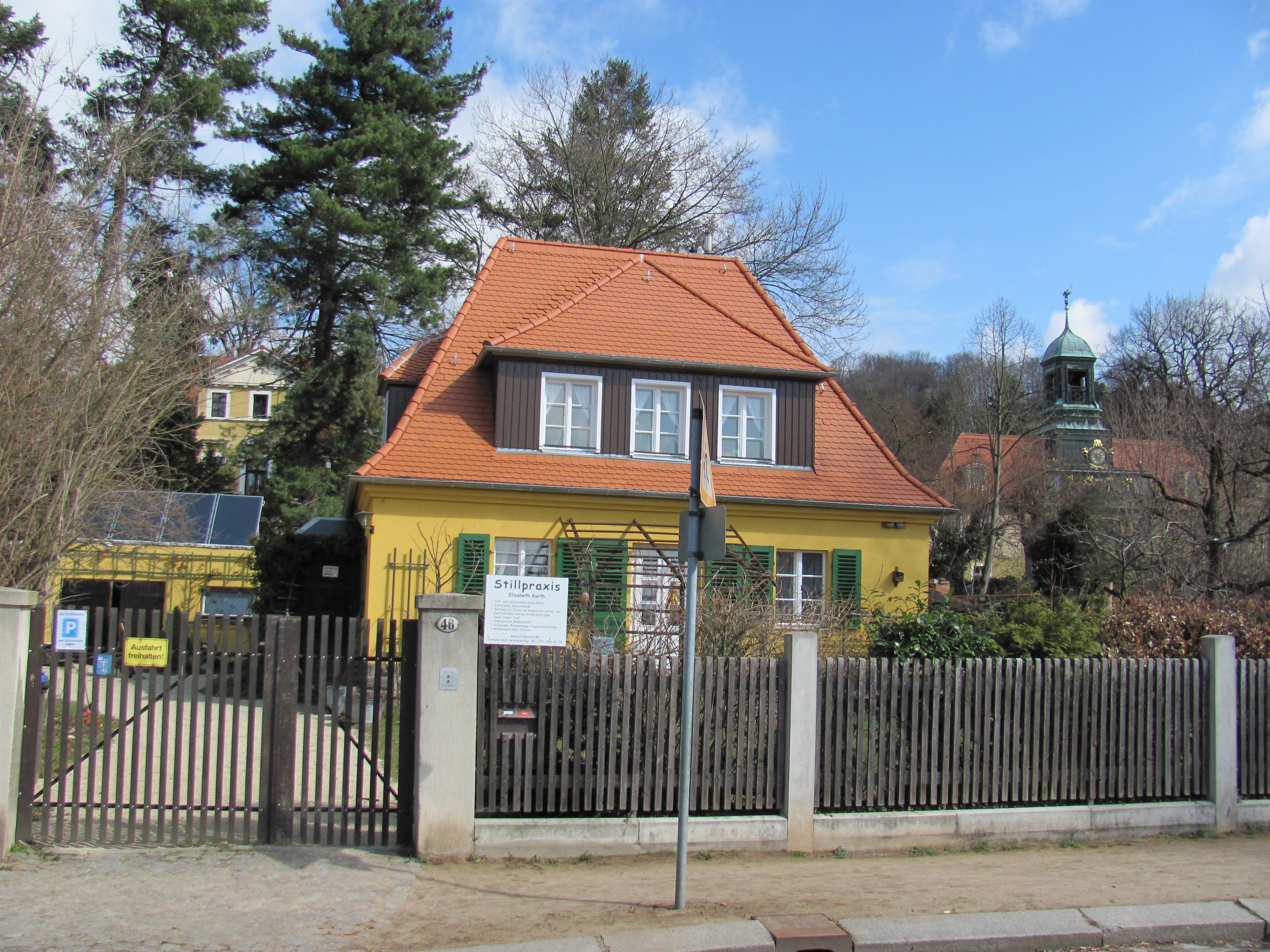 Radebeul, Einfamilienhaus Alfred Tischer. Rechts der Turm von Haus Sorgenfrei, links der Giebel von Villa Steinbach